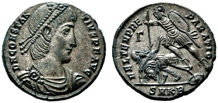 Constantius II. (337-361) als Augustus. Maiorina (6,17g), Cyzicus, 351-354 n. Chr. Soldat mit Lanze und Schild über gestürztem Reiter